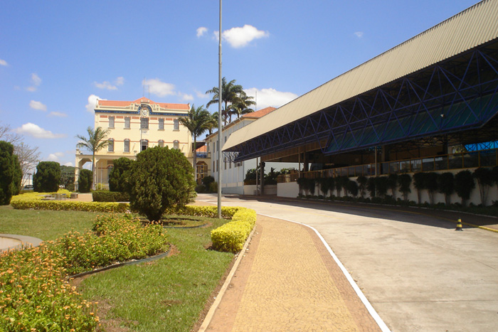 Faculdade Integrada Claretianas de Rio Claro